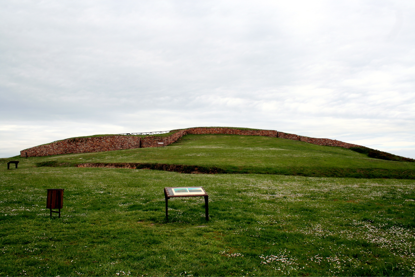 Muro defensivo de la Campa Torres